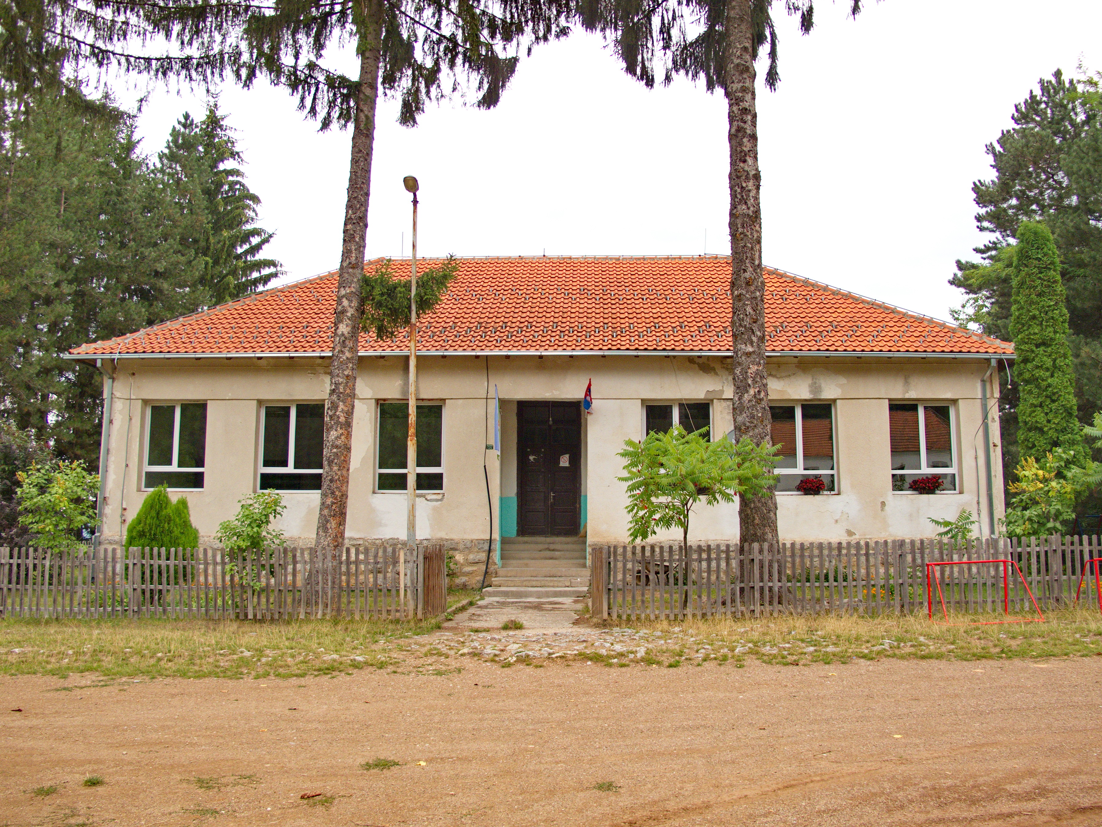 Висока, основна школа